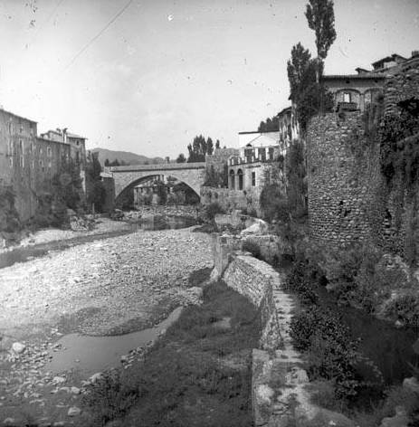 Imatge